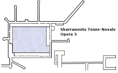 Mappa dell'opera 3 dello sbarramento di tenne